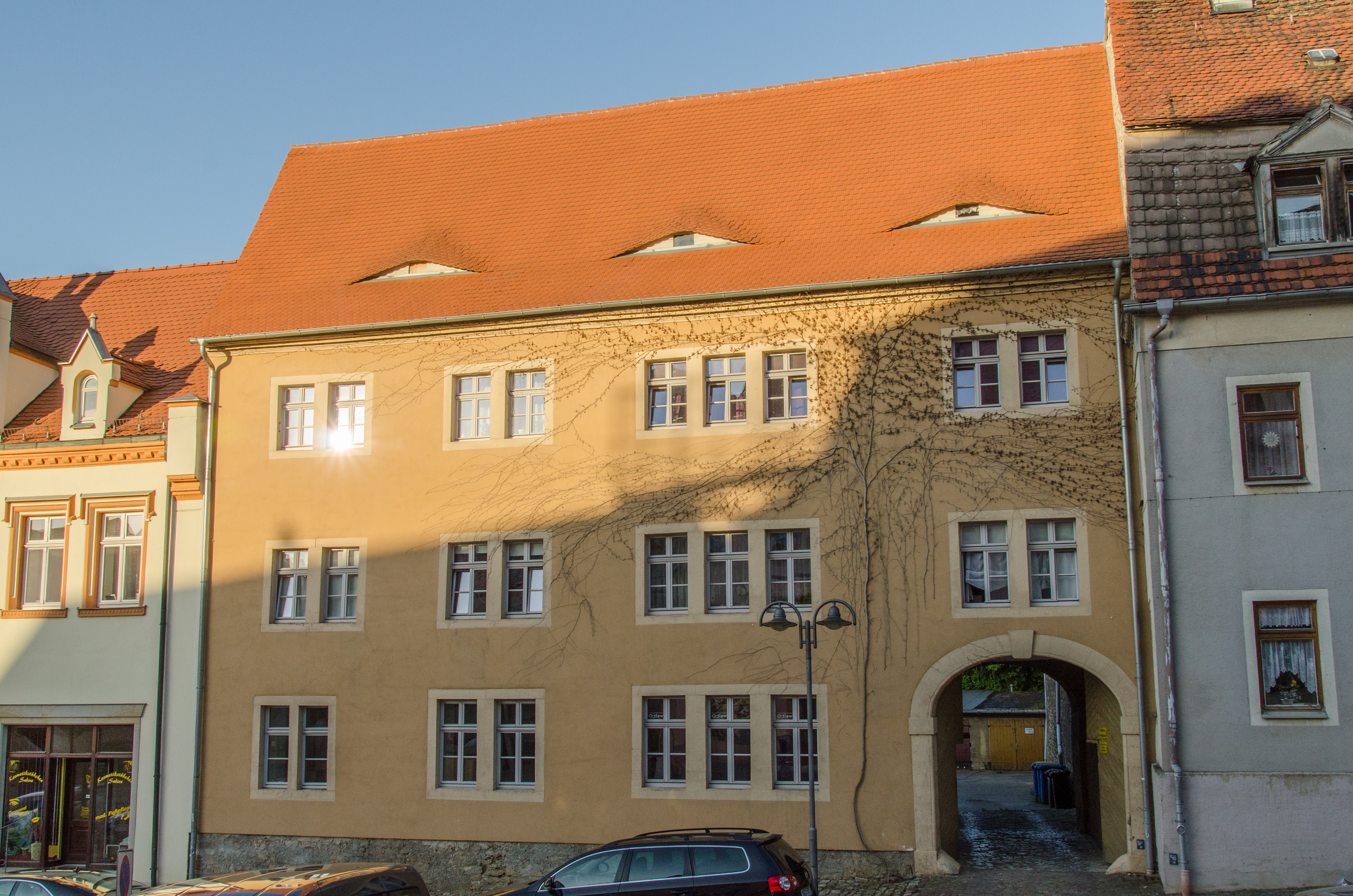 Querfurt, Markt 16